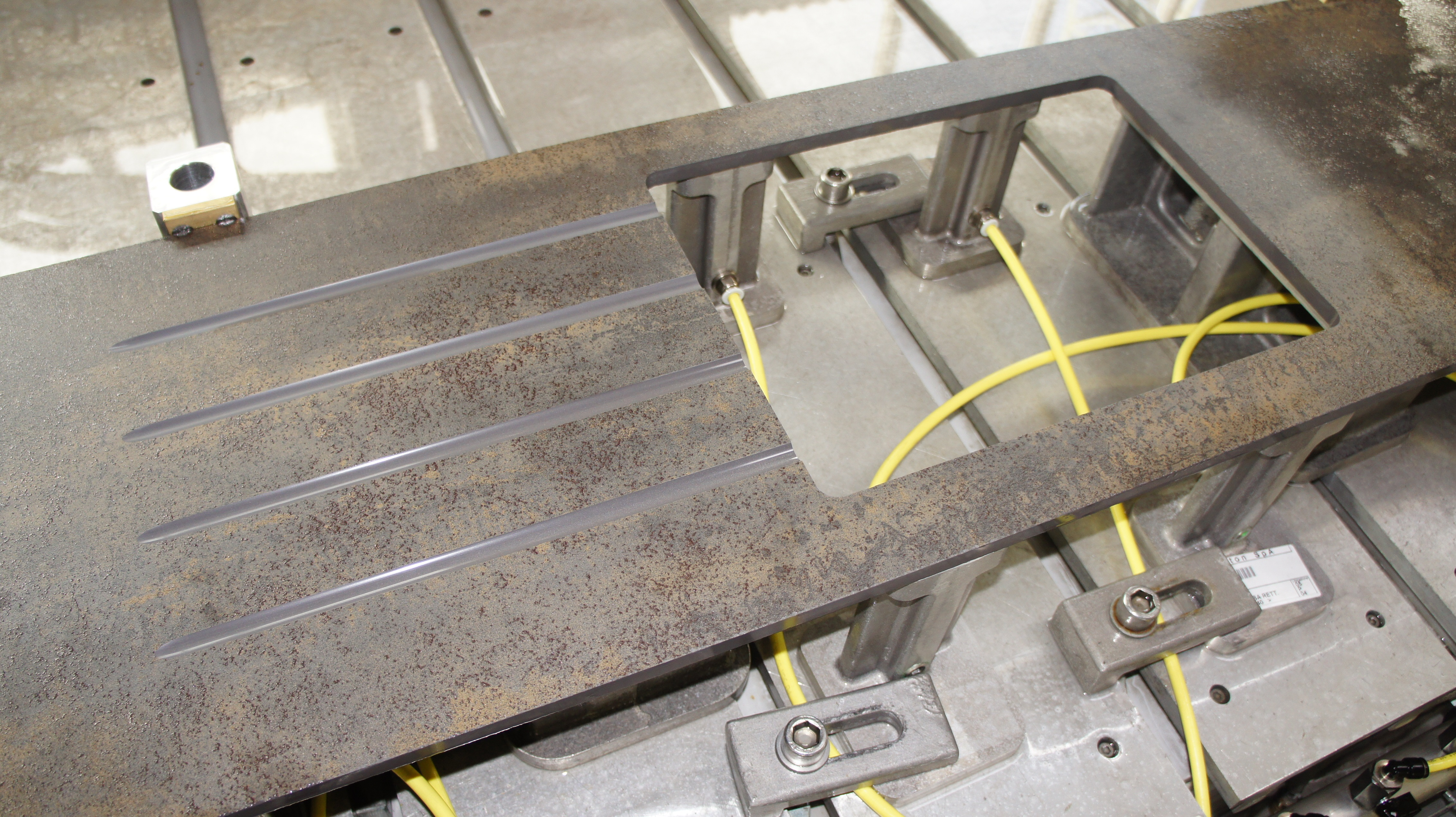 Keramikarbeitsplatte 12 mm